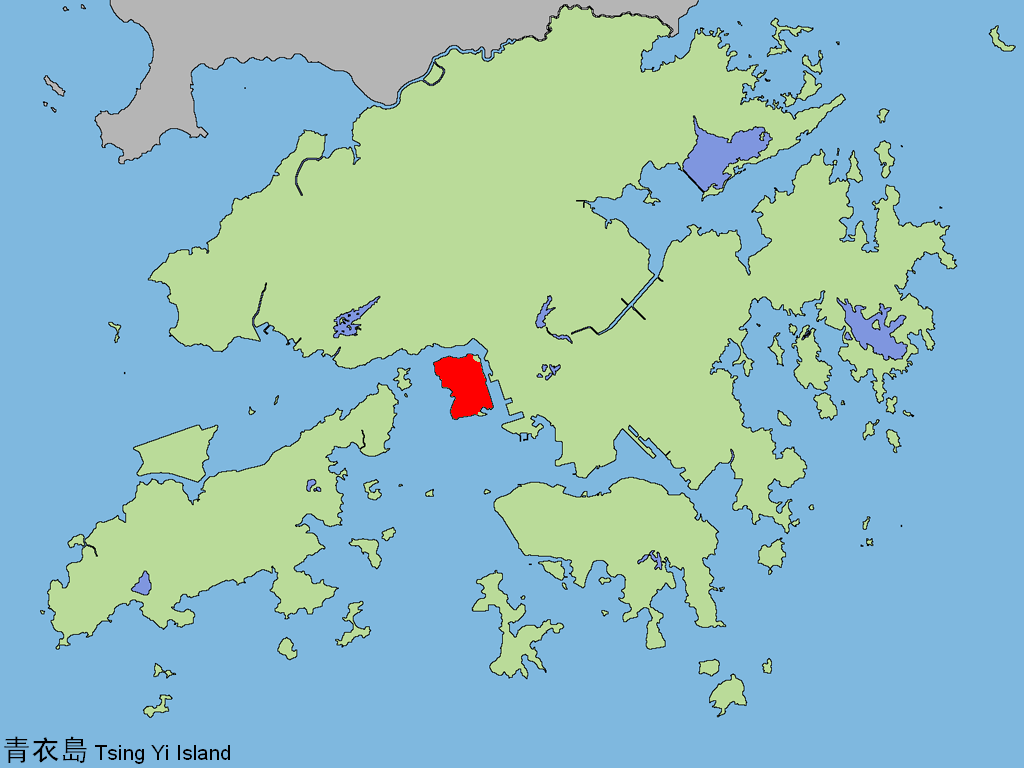 中文（香港）: 青衣島。